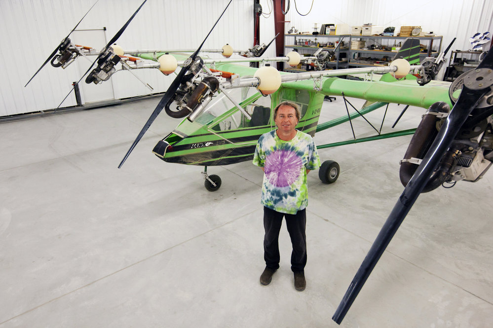 Ivo Žďárský v súčasnosti